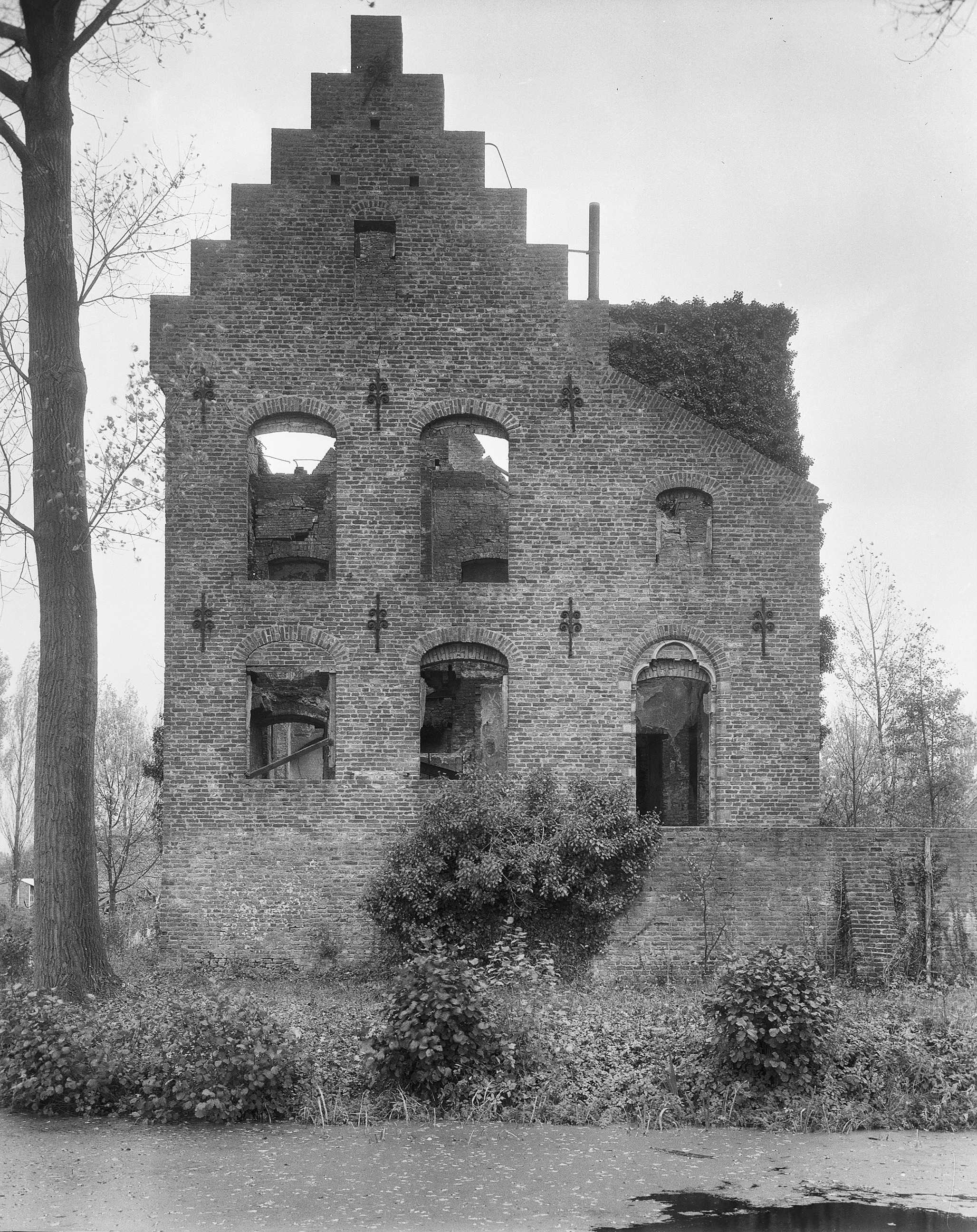 Kasteel: zijgevel